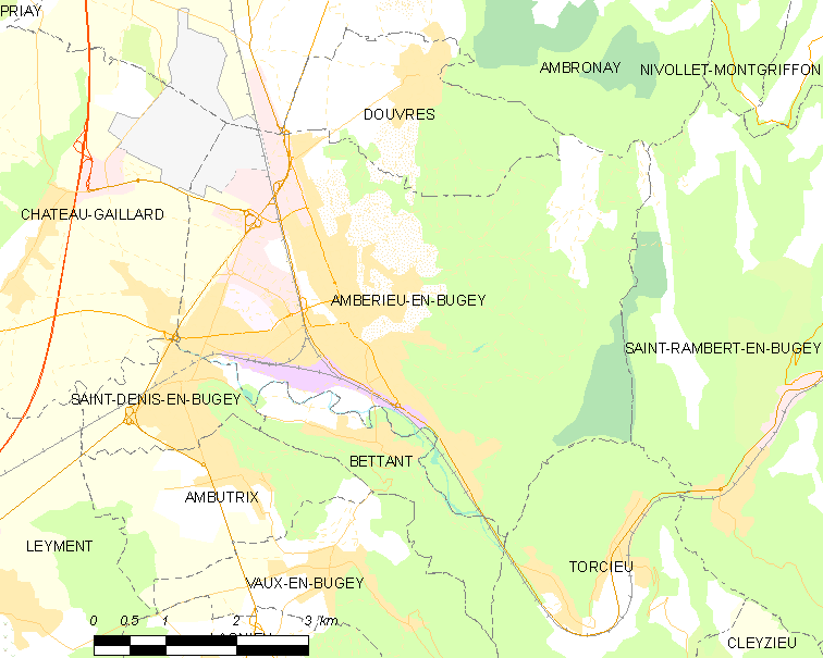 commune française: Ambérieu-en-Bugey Map commune FR insee code 01004.png